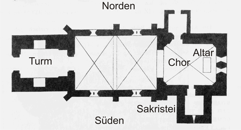 Grundriss der Kirche Lambrechtshagen (Mecklenburg)